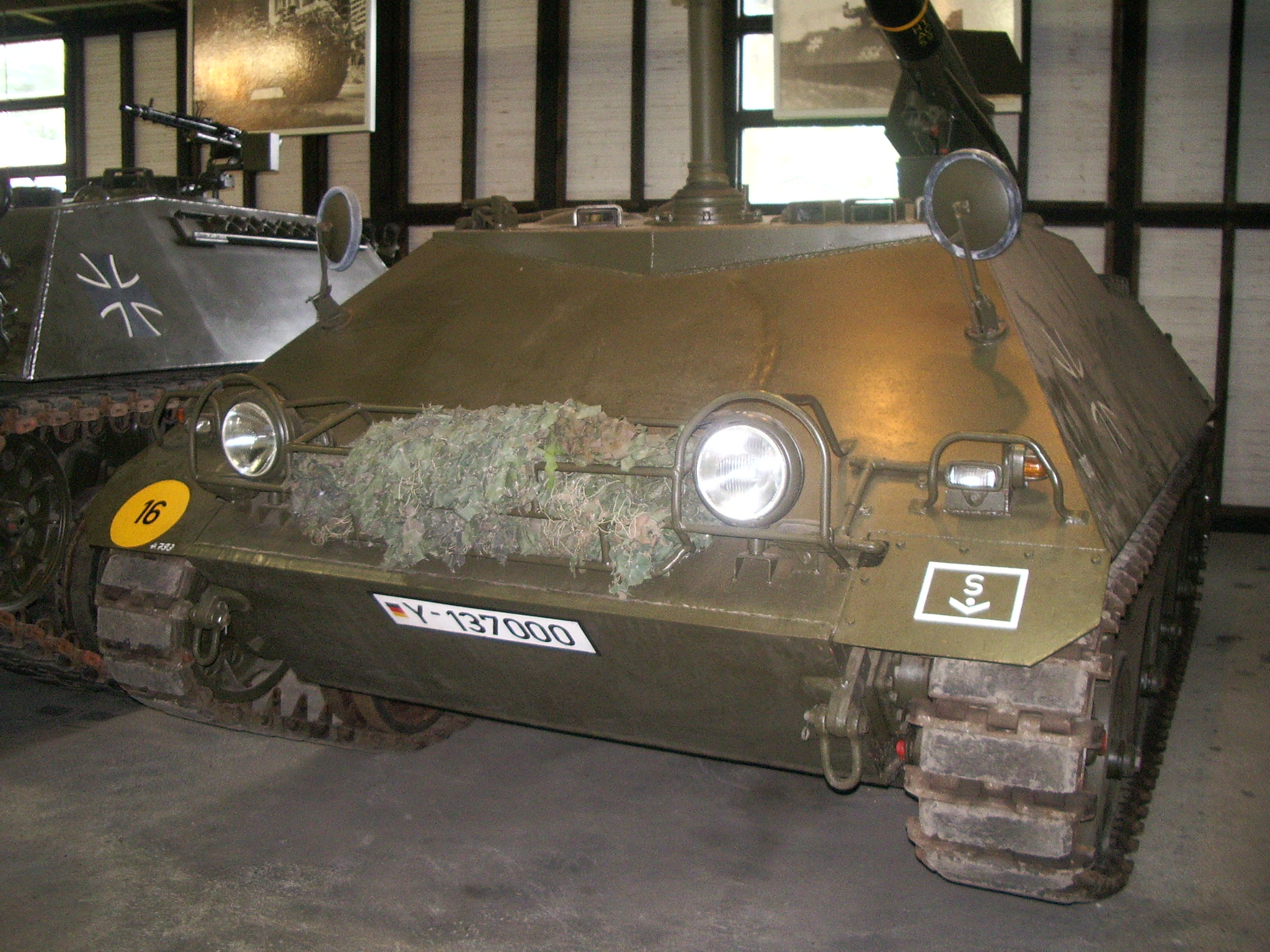 Raketenjagdpanzer 1 (auf Fahrgestell SPz HS 30) Besatzung: 3 Soldaten Gewicht: 13 Tonnen Motorleistung: 168 kW (220 PS) Bewaffnung: Lenkflugkörper SS 11 und 1 Flieger-Abw-MG Kaliber 7,62 mm Baujahr: 1961 - 1962 Stückzahl: 95